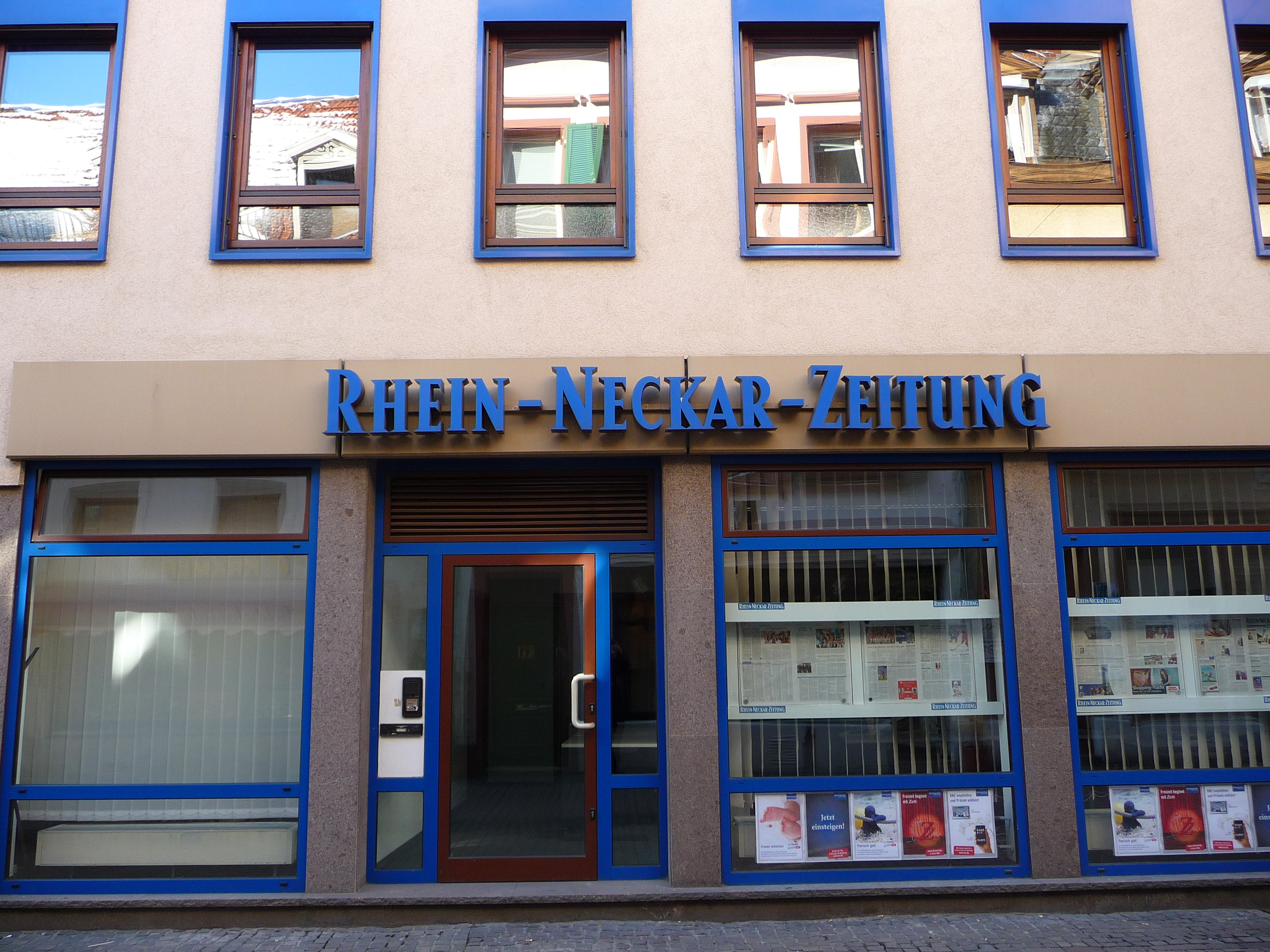 Verlagsgebäude der Rhein-Neckar-Zeitung in der Neugasse in Heidelberg (Baden-Württemberg, Deutschland)